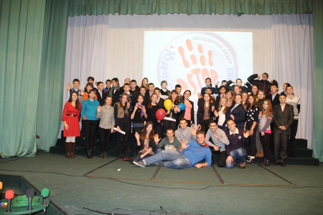 Програма Адреналін